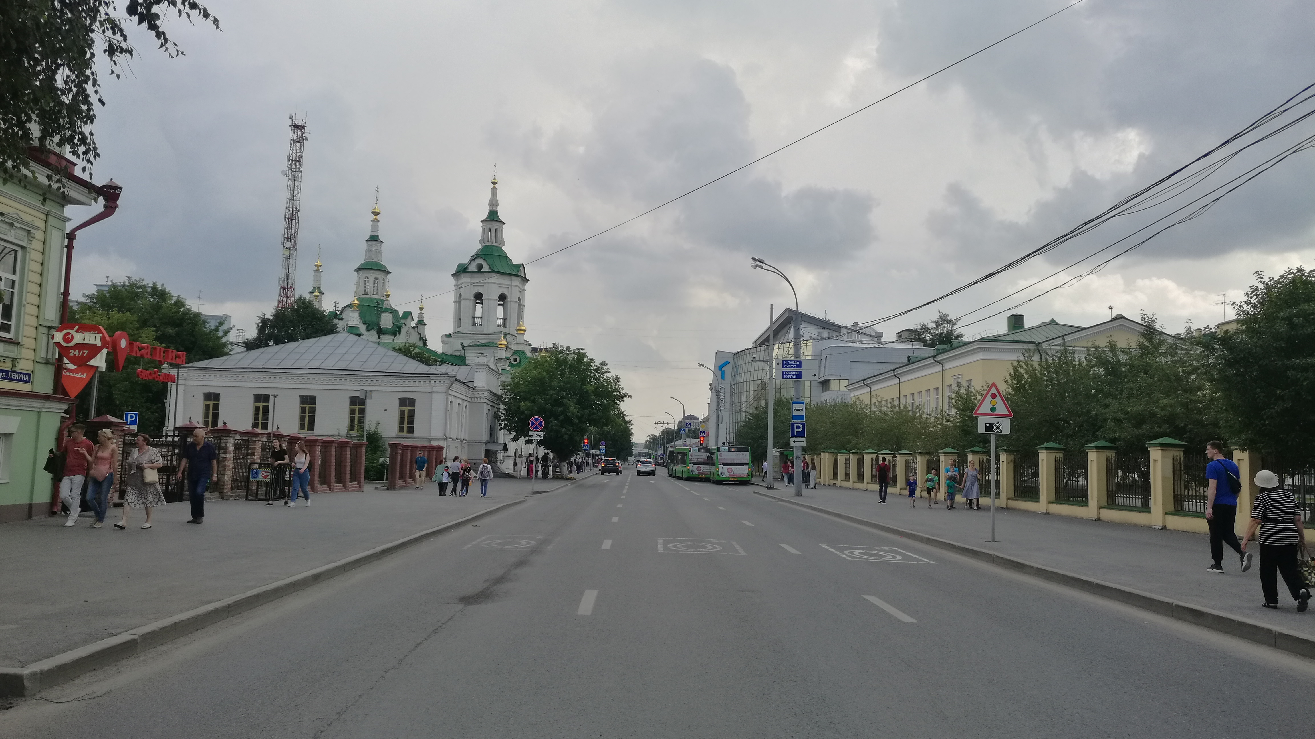 Strato Lenin. Tjumeno, Rusio.